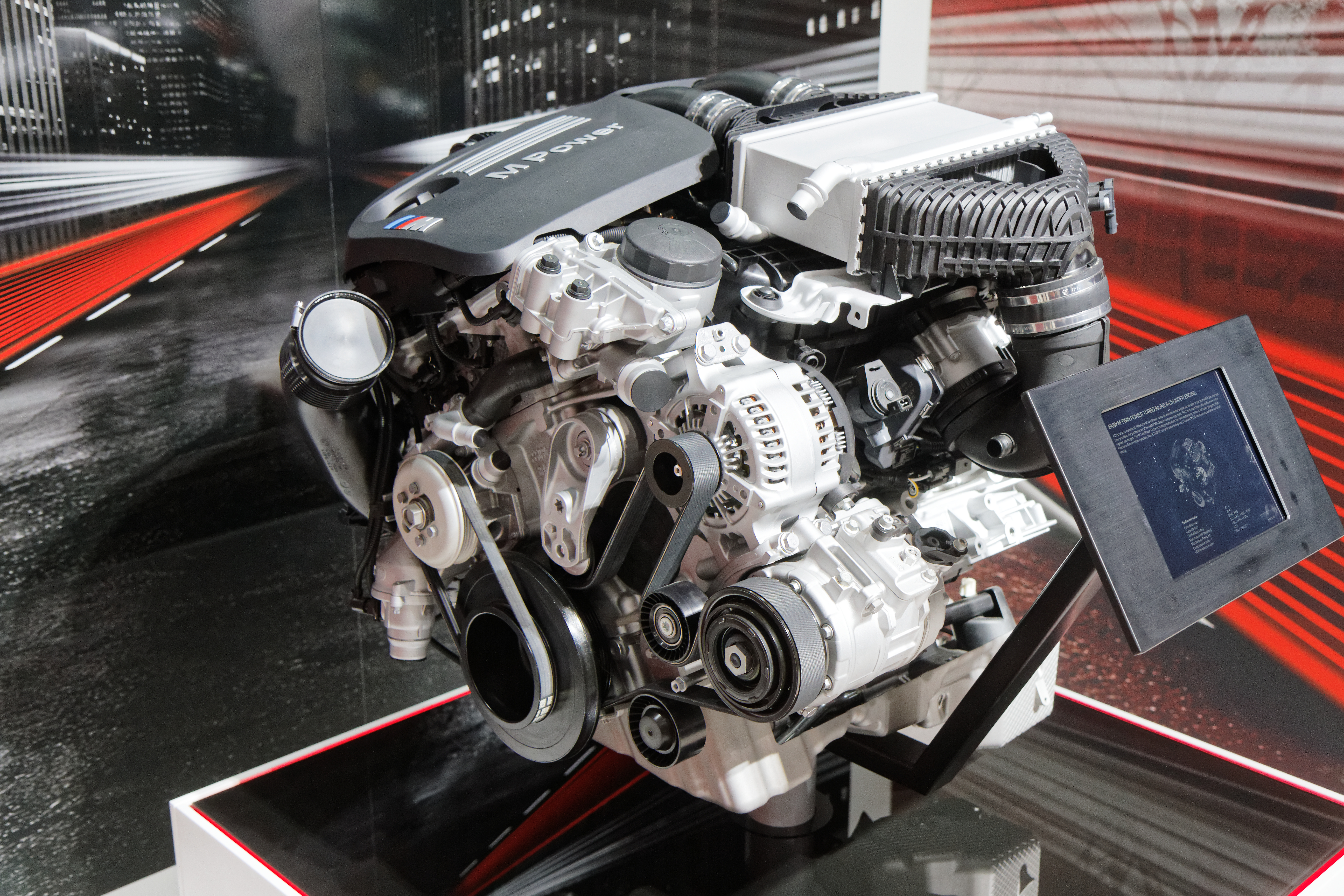 Un moteur BMW M Twin power turbo présentée lors du mondial de l'automobile de Paris 2014.